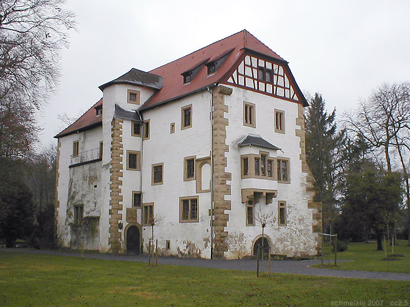 Altes Schloss in Neckarbischofsheim